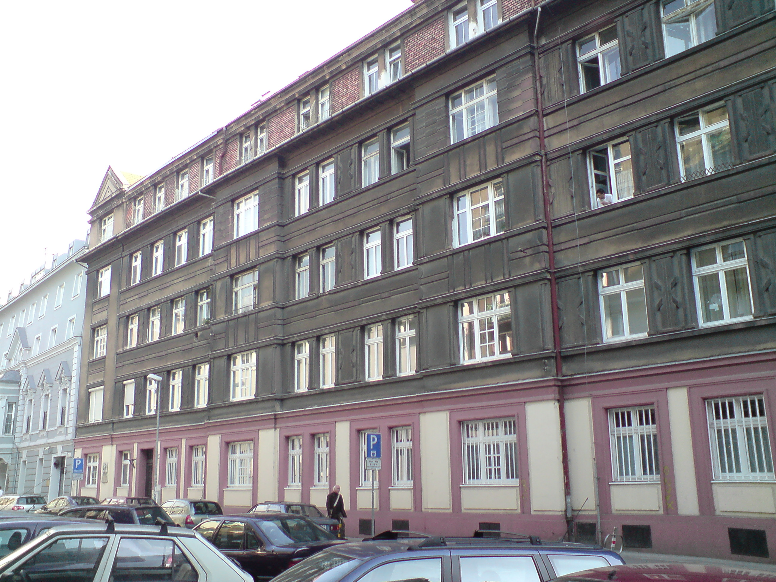 Viola Valachová house, Bratislava